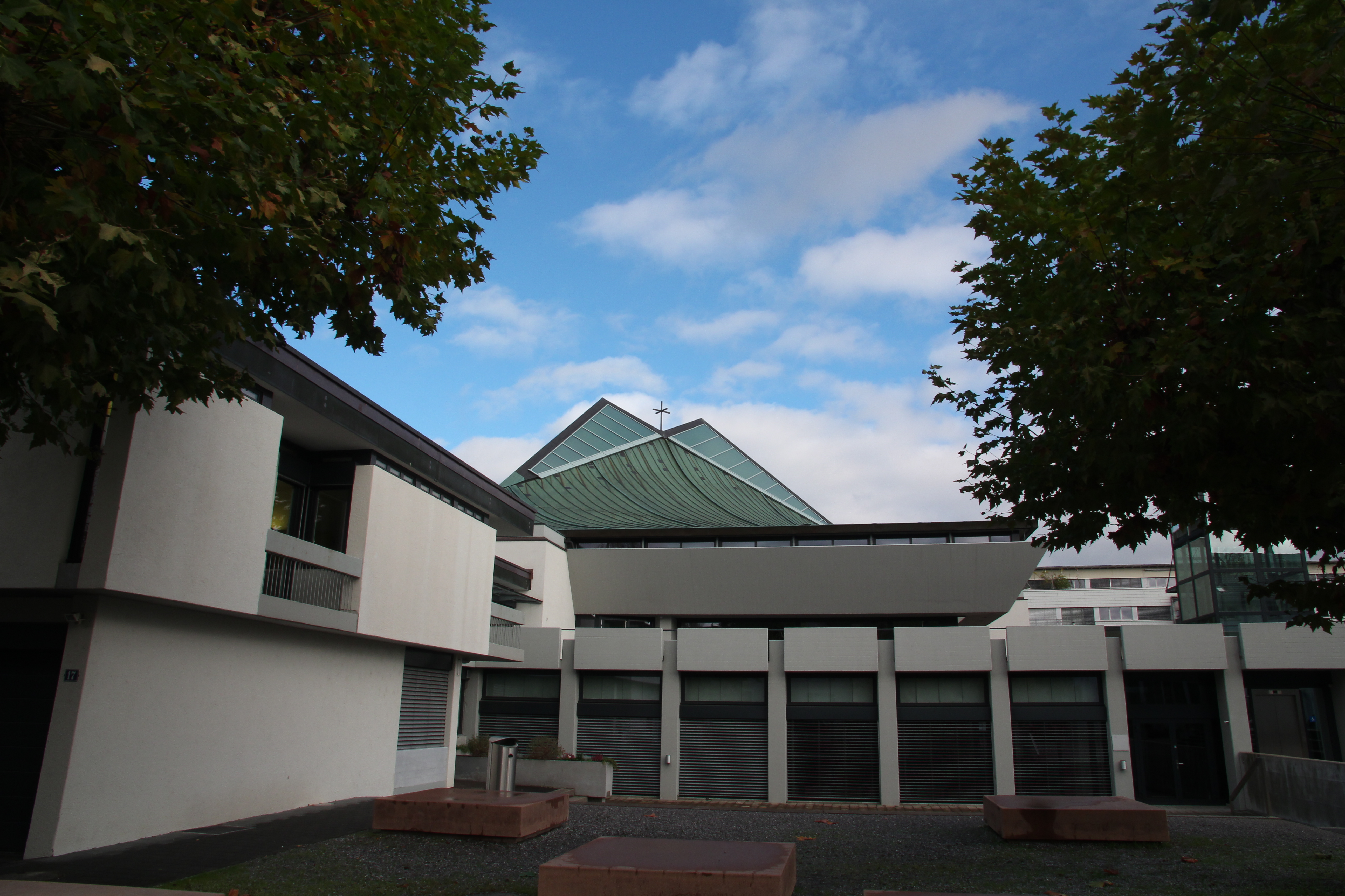 Römisch-katholische Pfarrkirche St. Andreas Uster, Ansicht von Südwesten